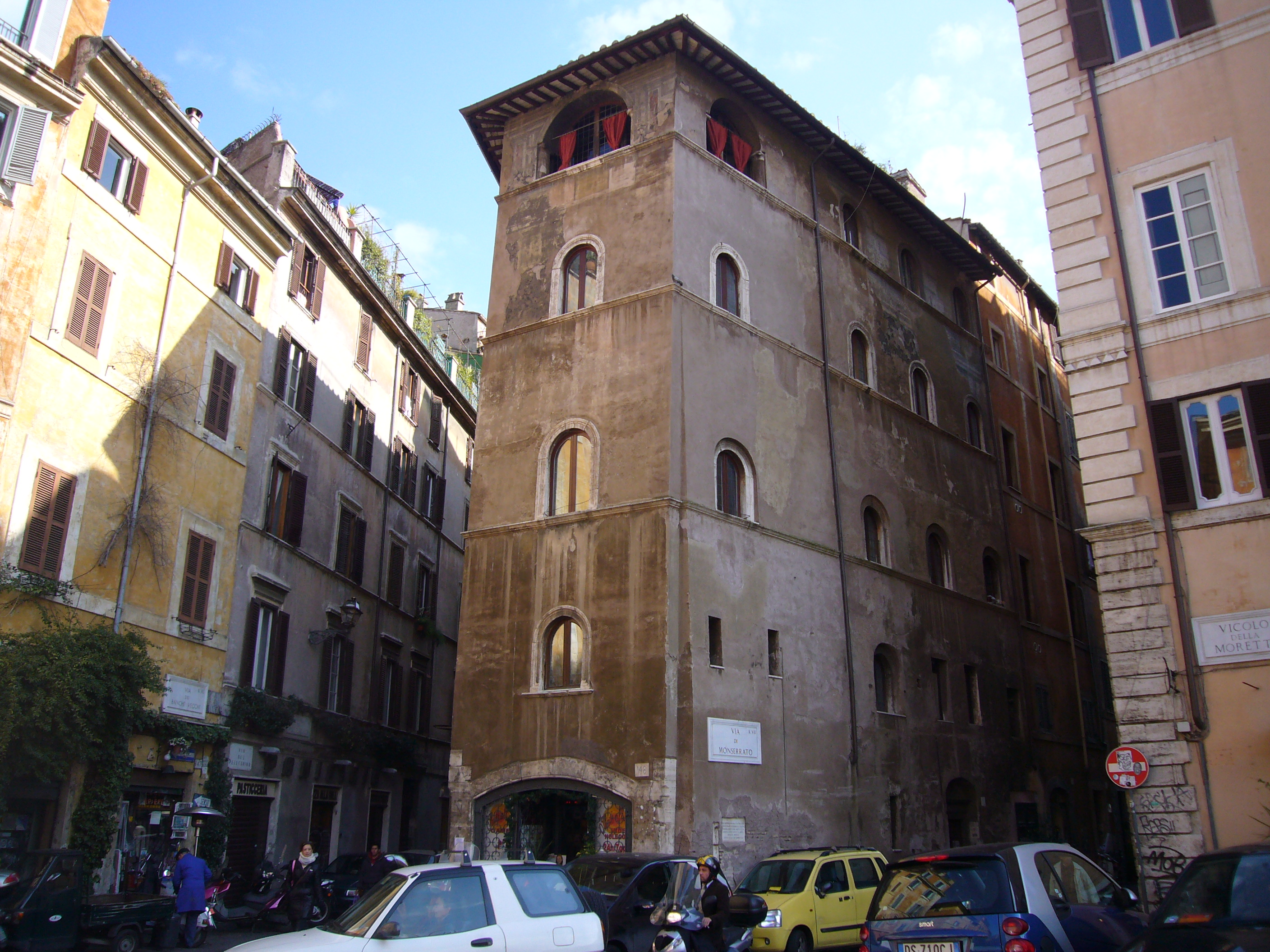 Roma, via del Pellegrino, via di Monserrato, vicolo della Moretta. Al centro, il palazzo di Paolo della Zecca alla Chiavica di Ponte.